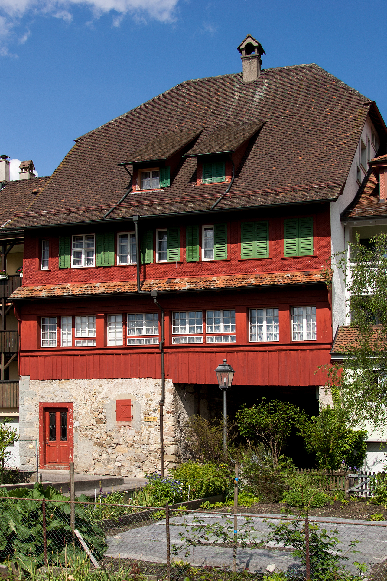 Rathaus von Sempach von der Seeseite her gesehen